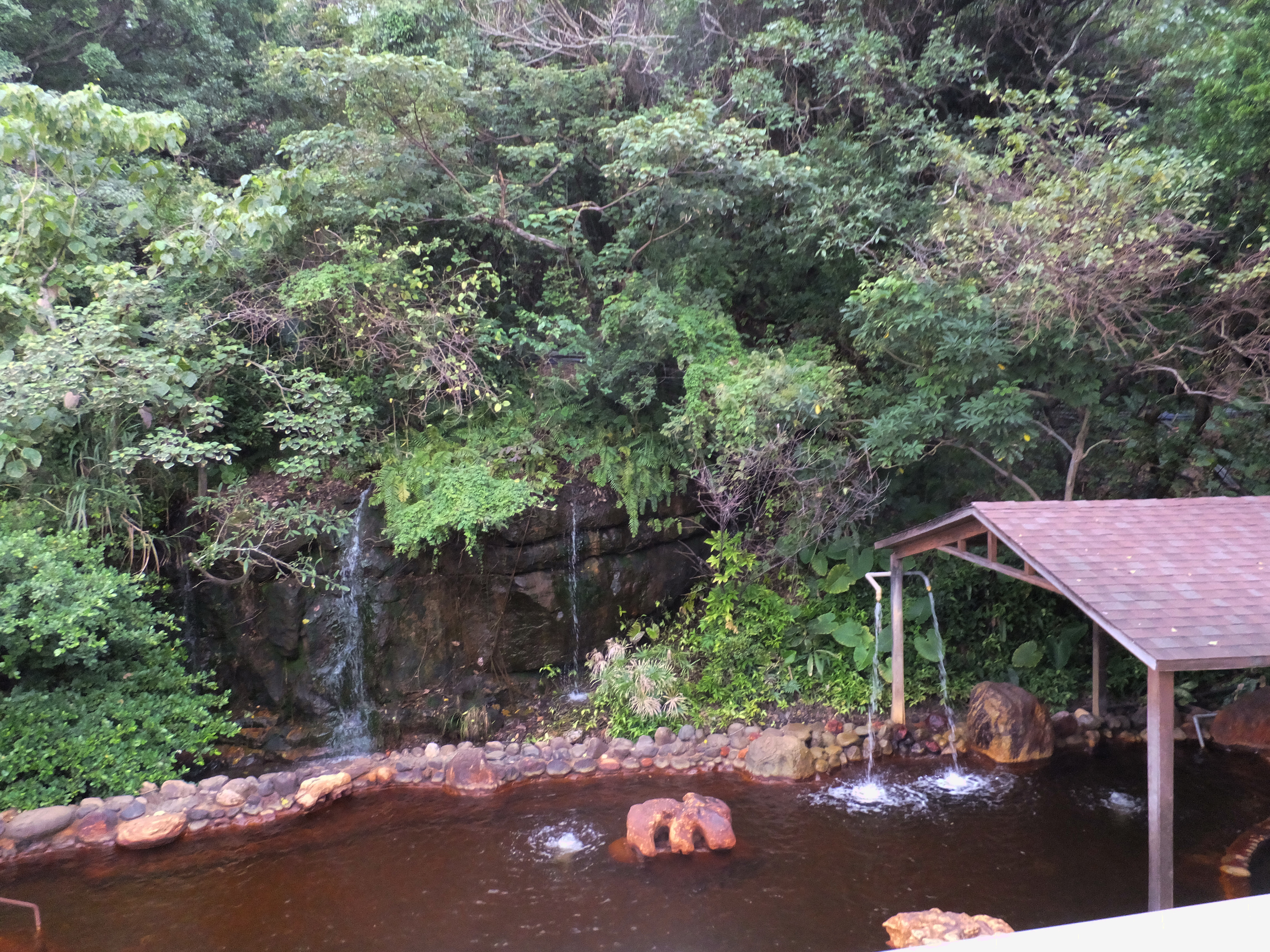 Jiujinshan Zongdu Hotspring 舊金山總督溫泉